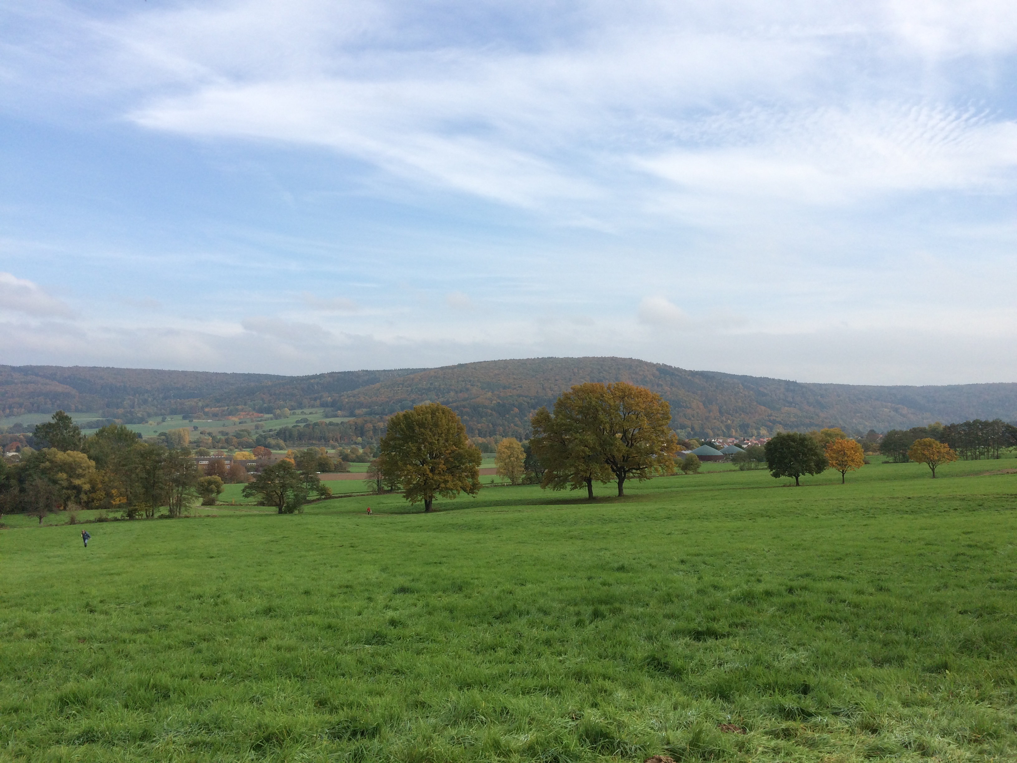 Blick von einem Feldweg oberhalb der Mittelpunktsportanlage Reinhardshagen in das Wesertal